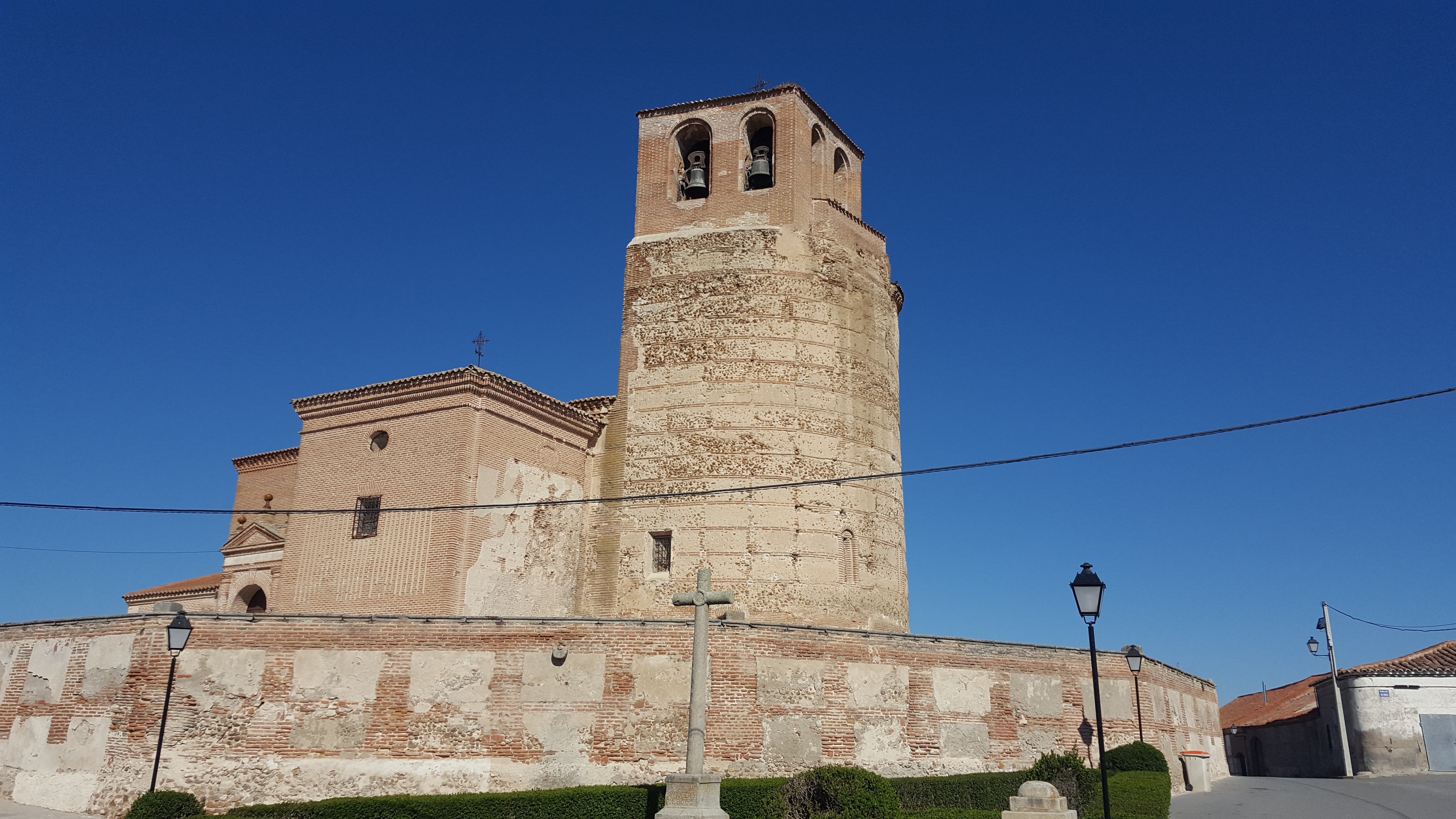 Iglesia de La Asunción, estilo mudéjar, Barromán, Ávila